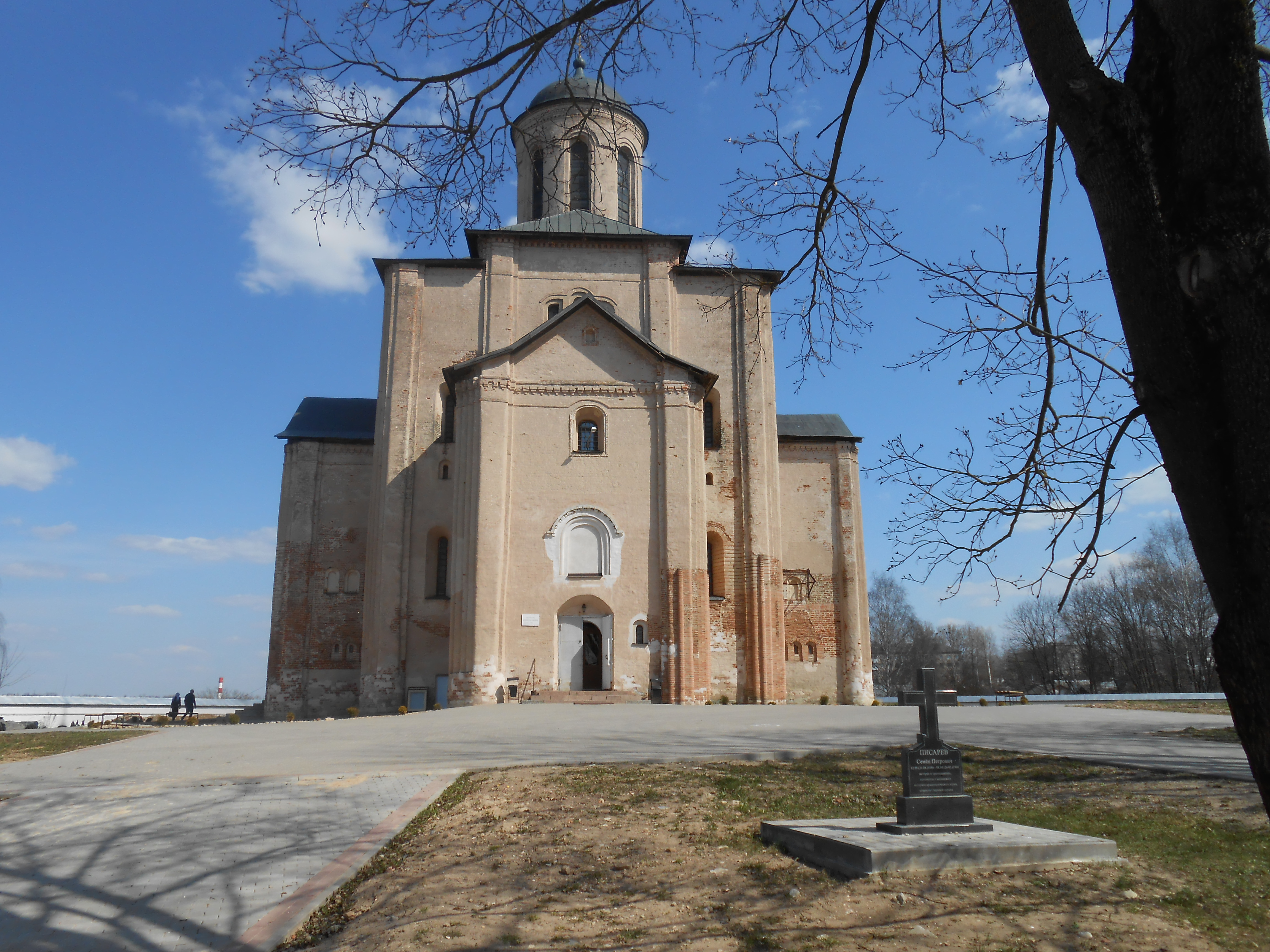 Смоленск, Свирская церковь. Кенотаф С. П. Писарева.